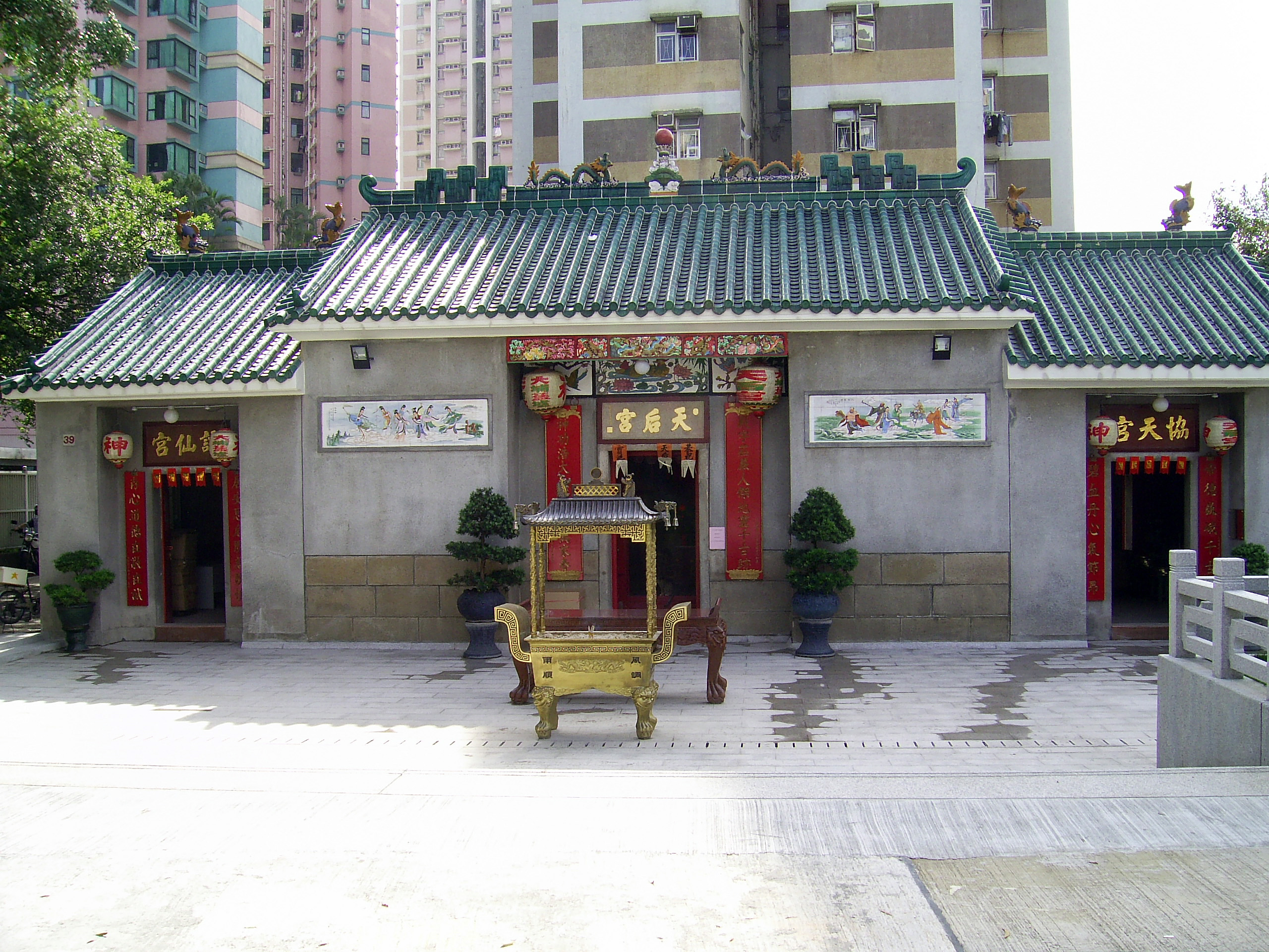 中文（香港）: 大埔舊墟天后廟